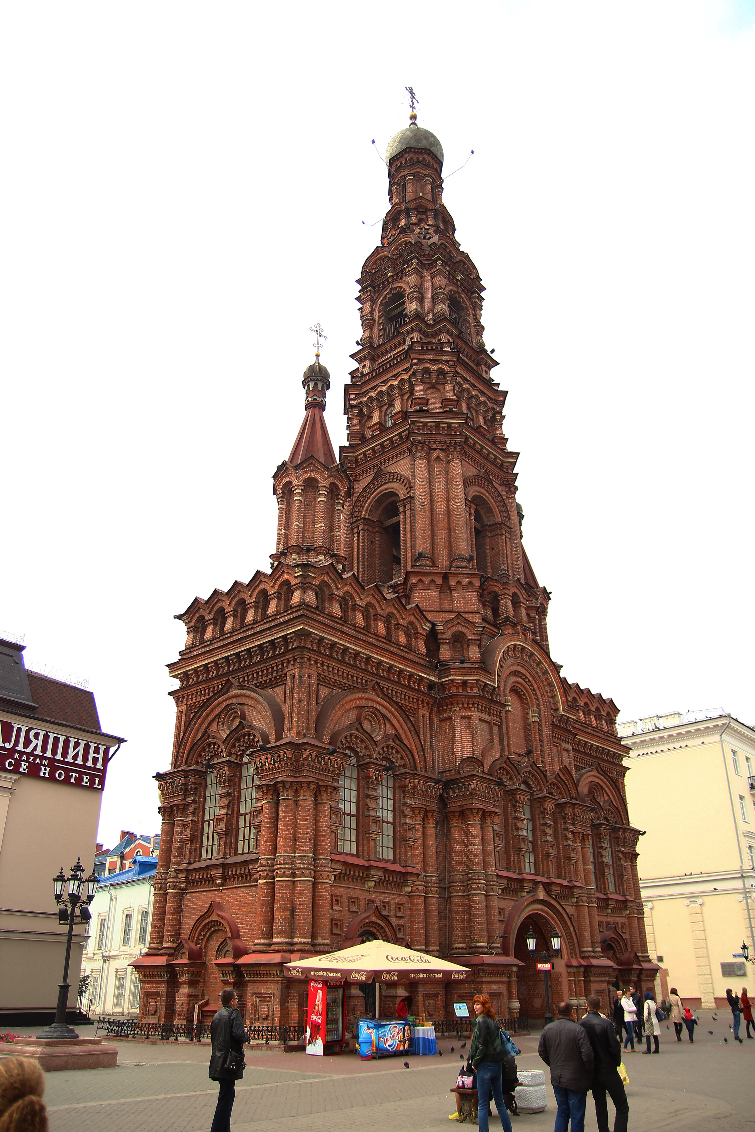 Колокольня (Республика Татарстан, Казань, Баумана улица, 76)